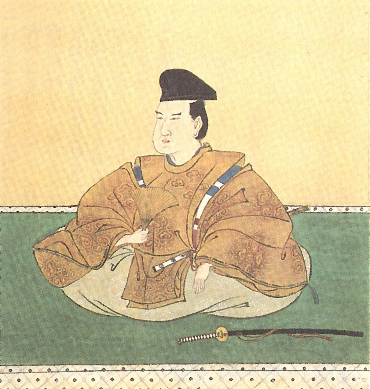 伊達宗倫(登米伊達氏)の肖像。